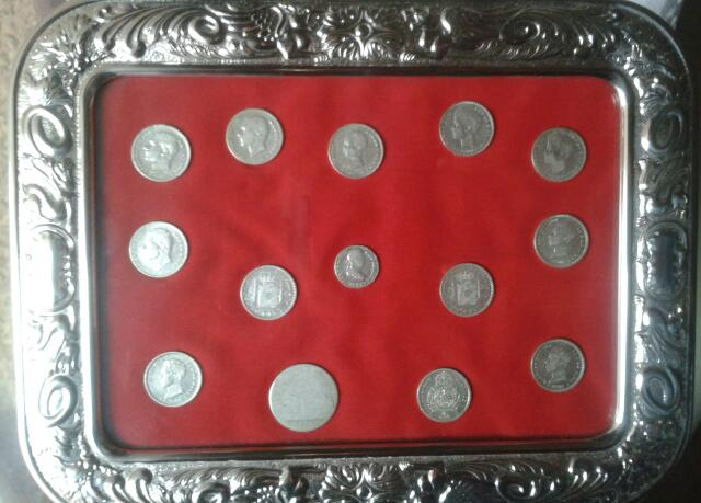 Monedas de plata de S. XIX, de los reinados de Fernando VII. Isabel II, Alfonso XII y Alfonso XIII, utilizadas como arras en las ceremonias de boda.